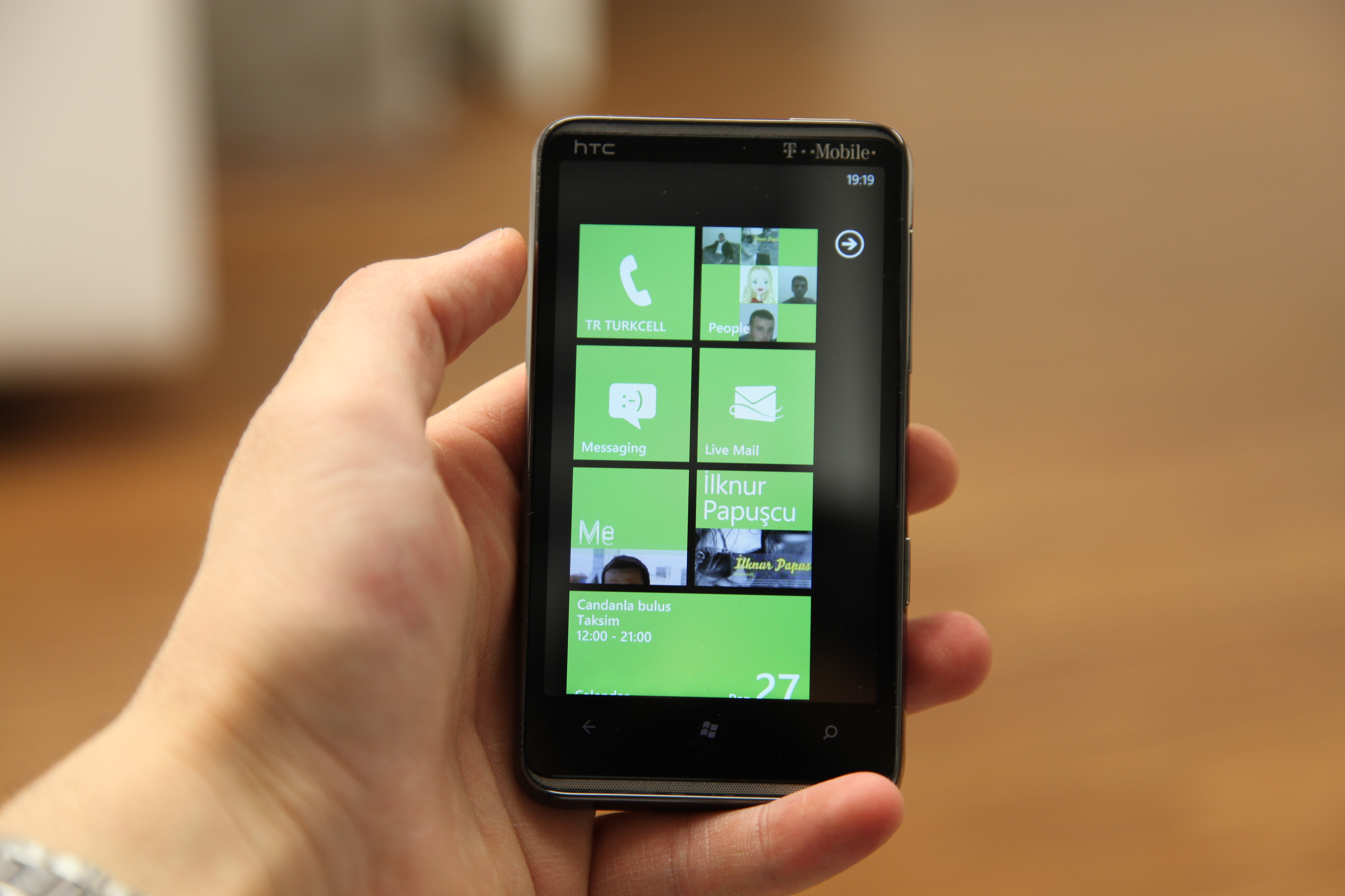 HTC HD7 7